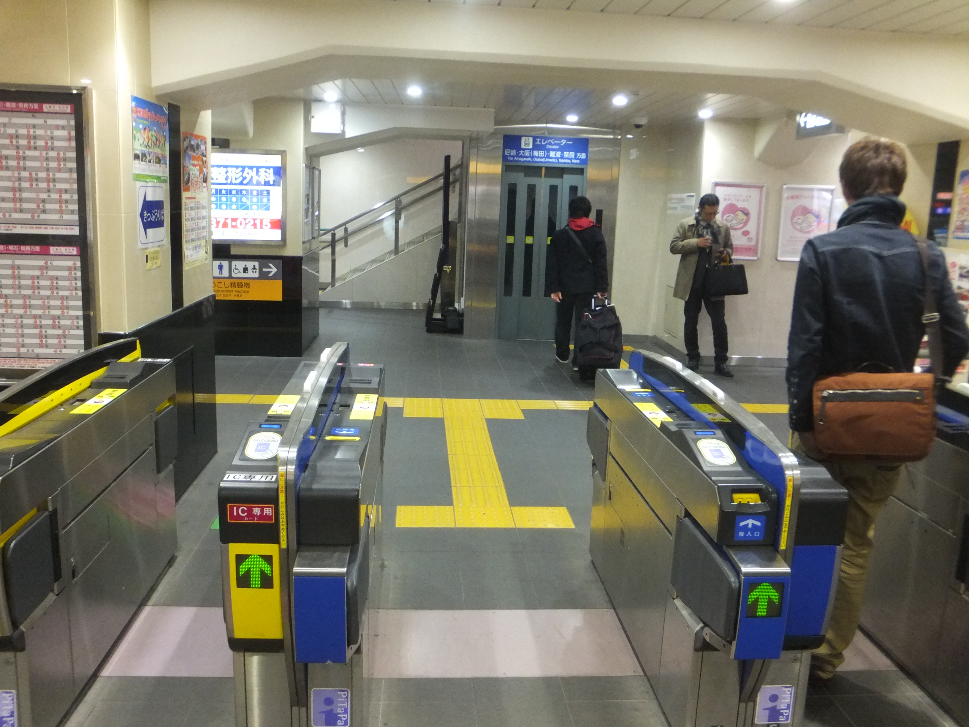 阪神御影駅北口 改札口